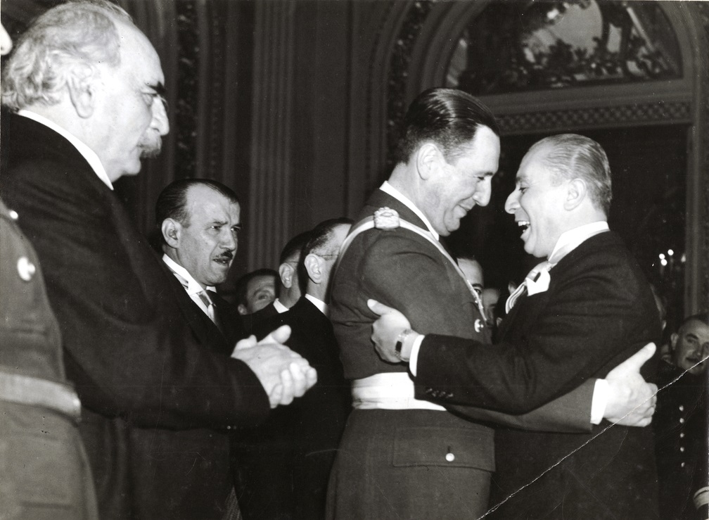 Sin fecha. El saludo de dos Presidentes: Gabriel González Videla y Juan Domingo Perón.